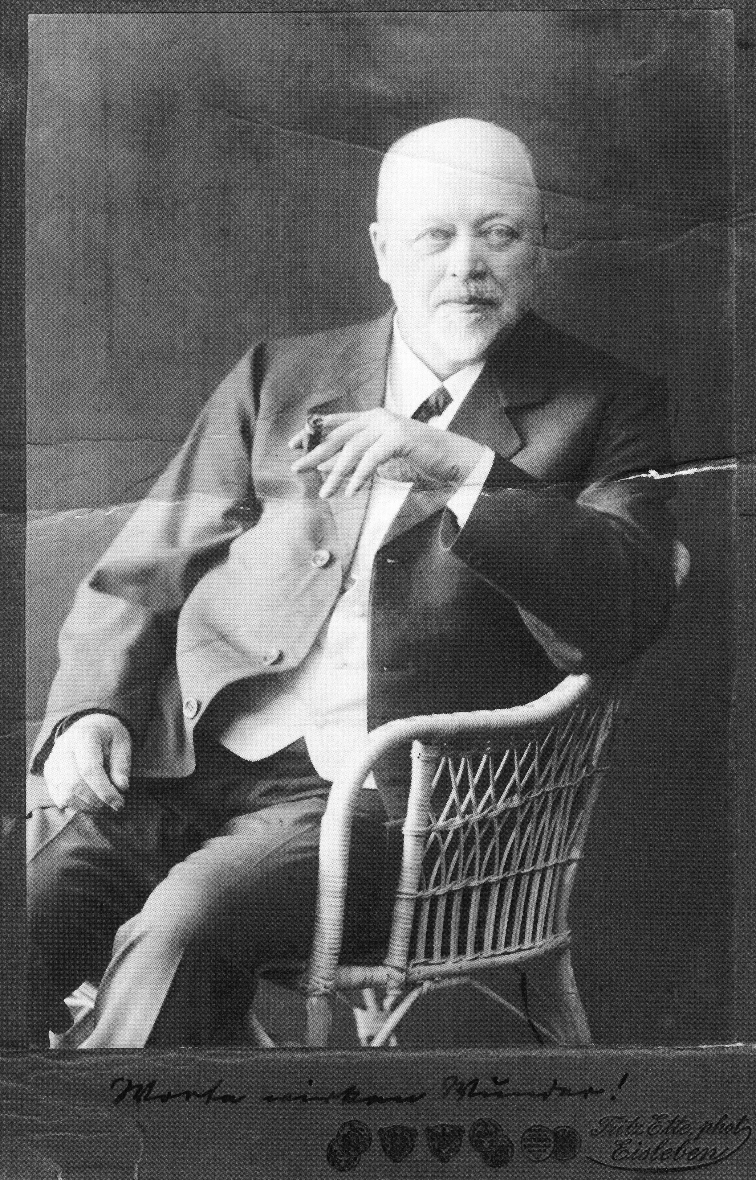 Portrait von Carl Eitz, handschriftlicher Spruch: "Worte wirken Wunder!"